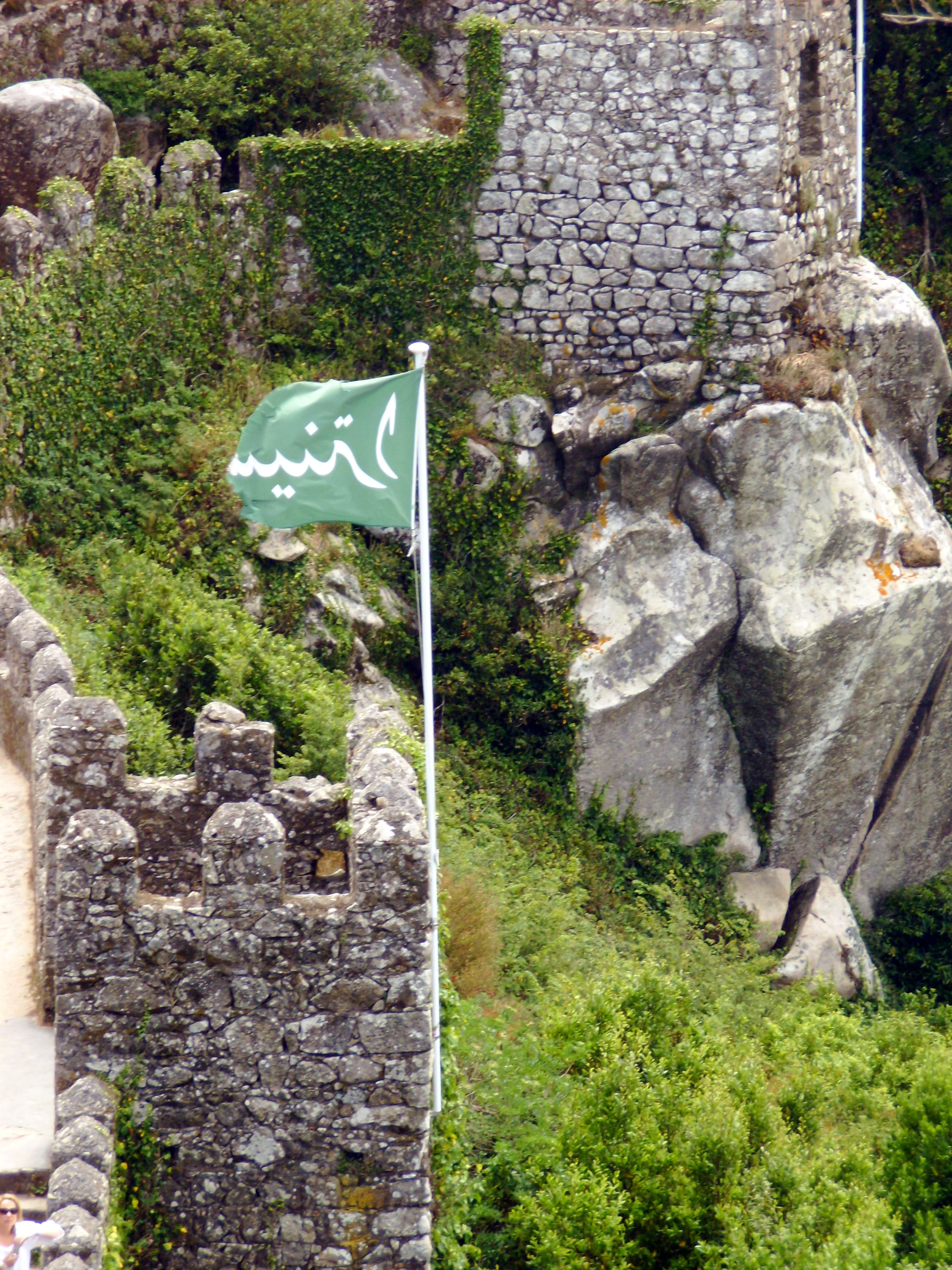 Castelo de Sintra (Castelo dos Mouros), Sintra, Portugal: aspecto de um dos cubelos.